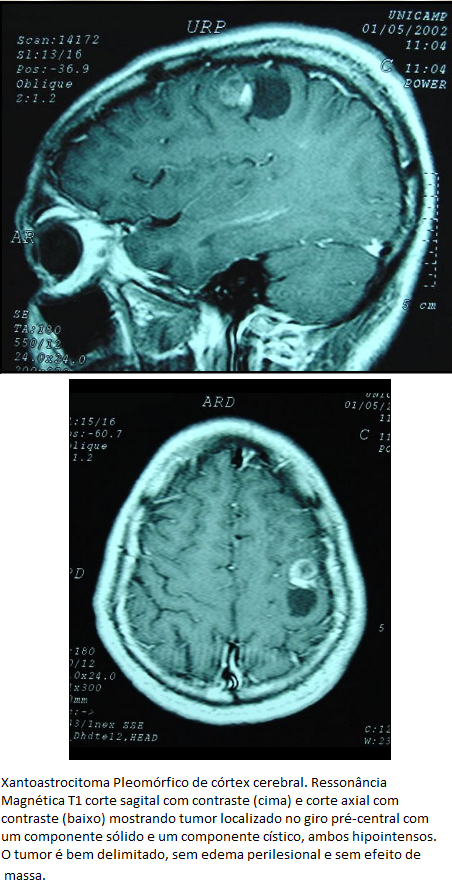 Xantoastrocitoma pleomórfico